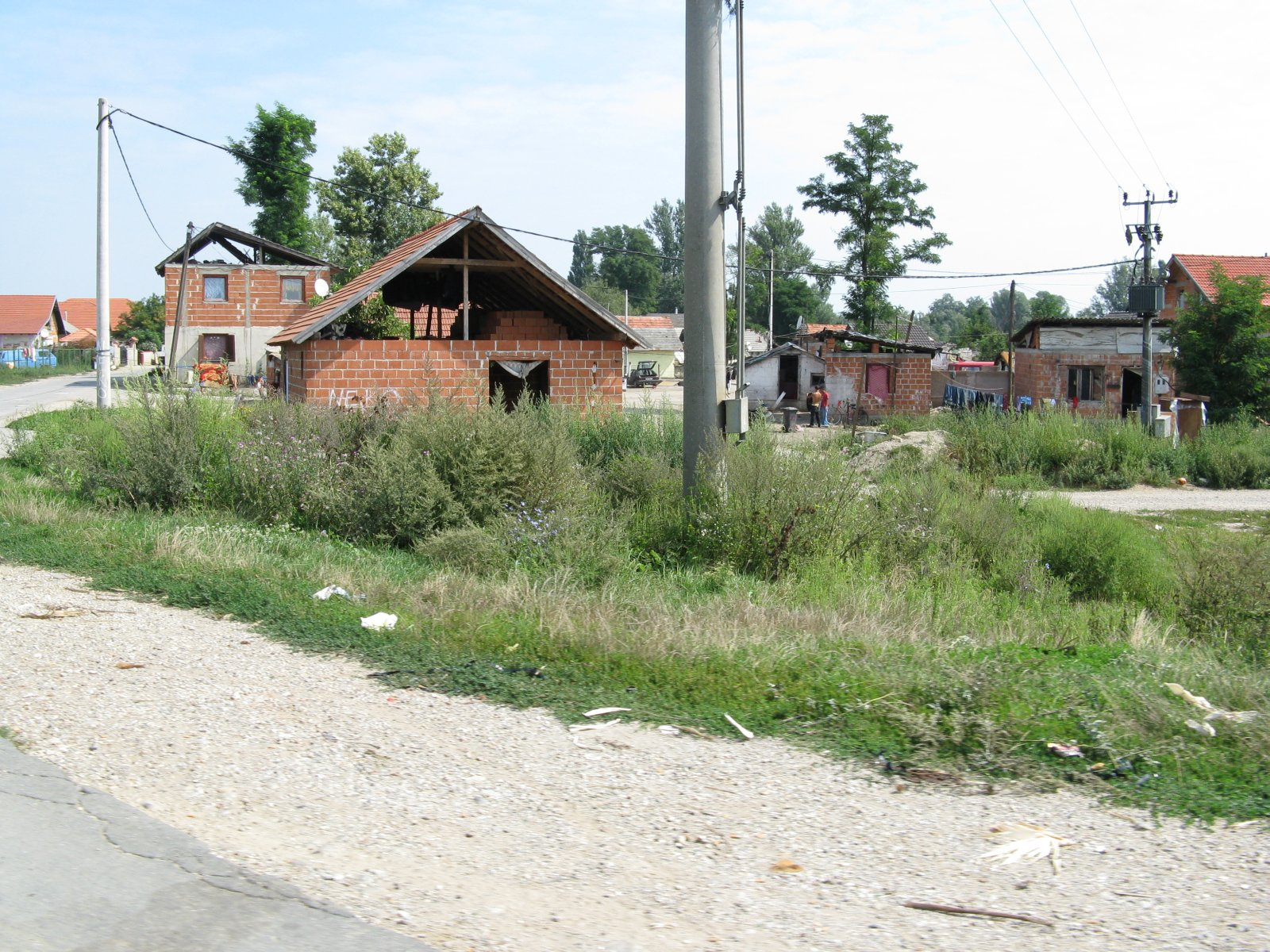 Romsko naselje